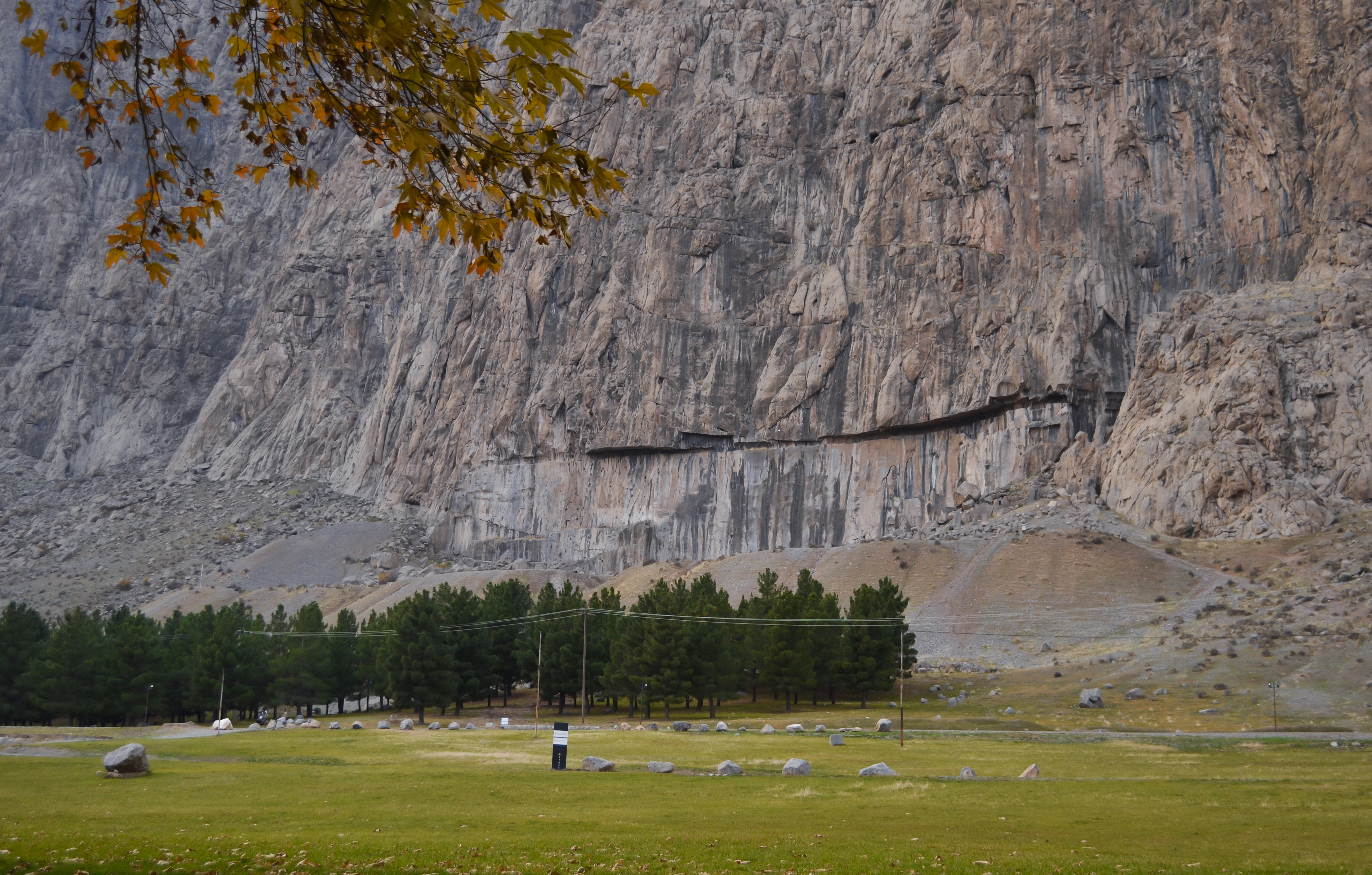 فرهاد تراش بیستون عکاس : سهیل چهری